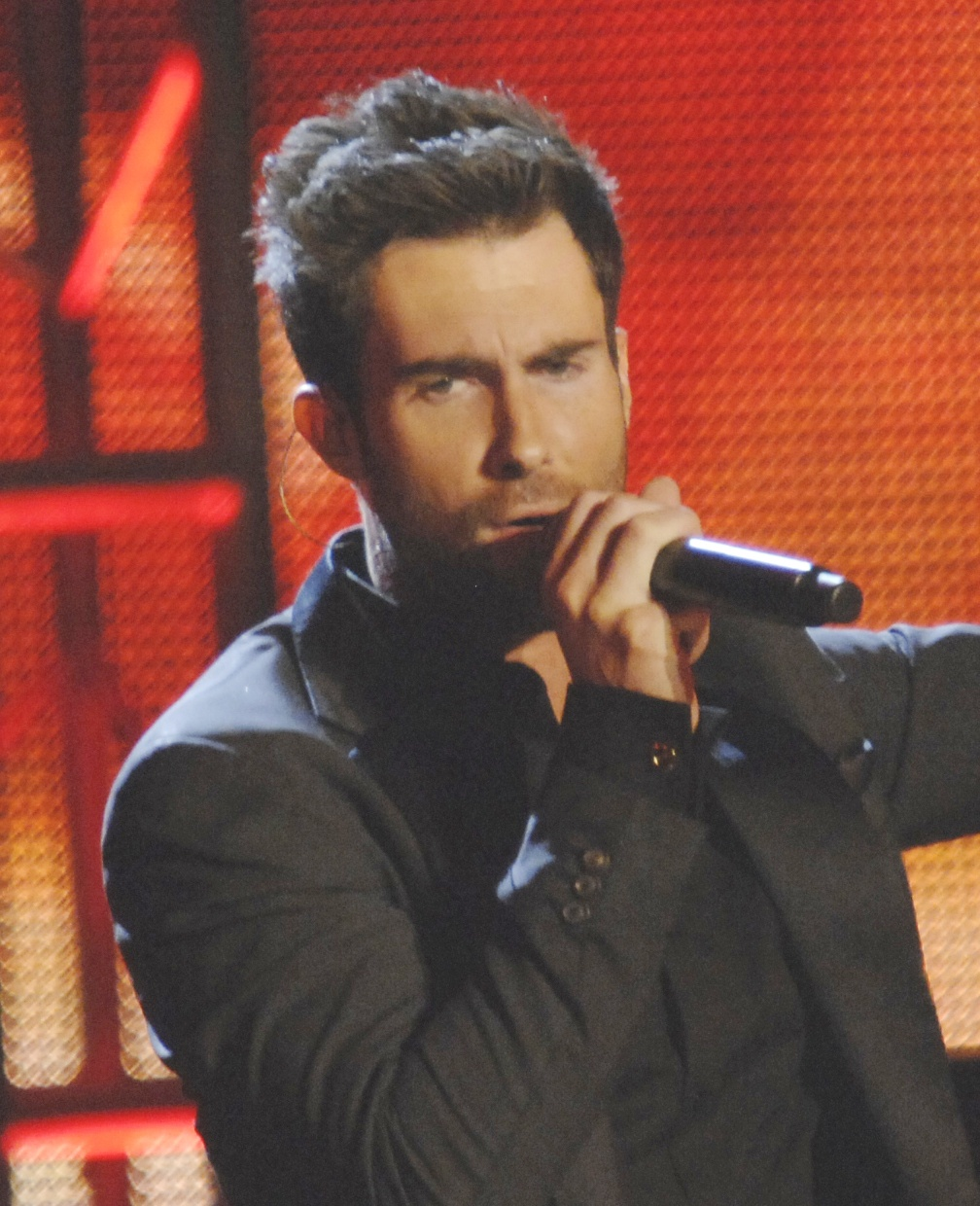 Adam